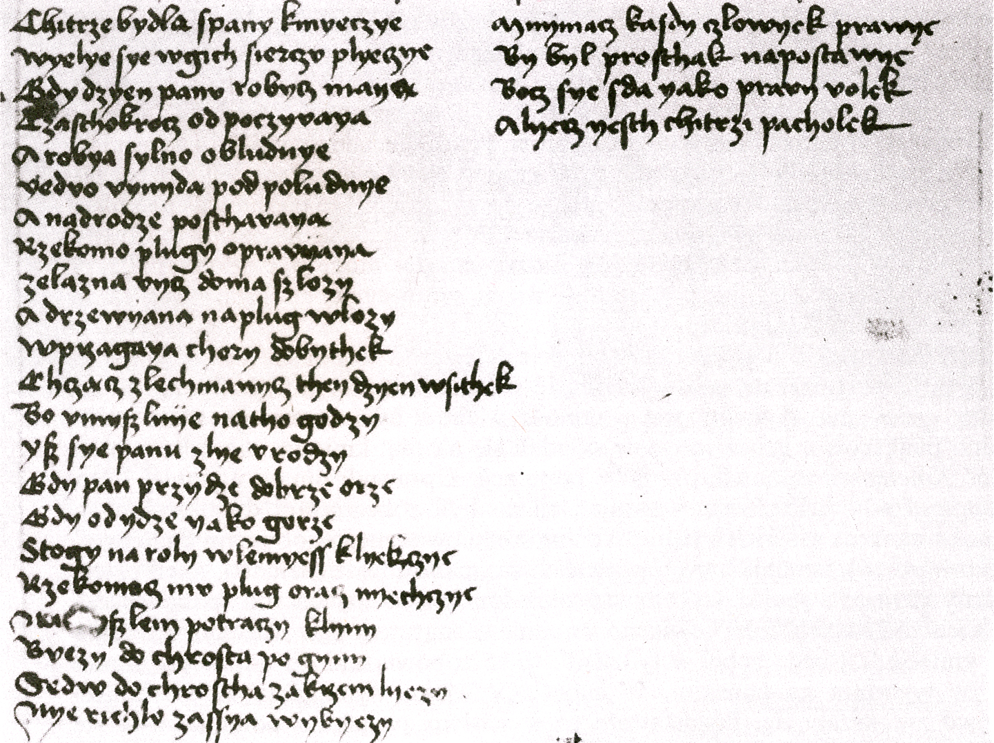 Rękopis Satyry na chytrych kmieciów (zwanej także: Satyrą na leniwych chłopów) przechowywany w Bibliotece Kapitulnej w Krakowie, sygn. 233, karta 2.